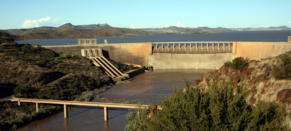 Gariep dam wall